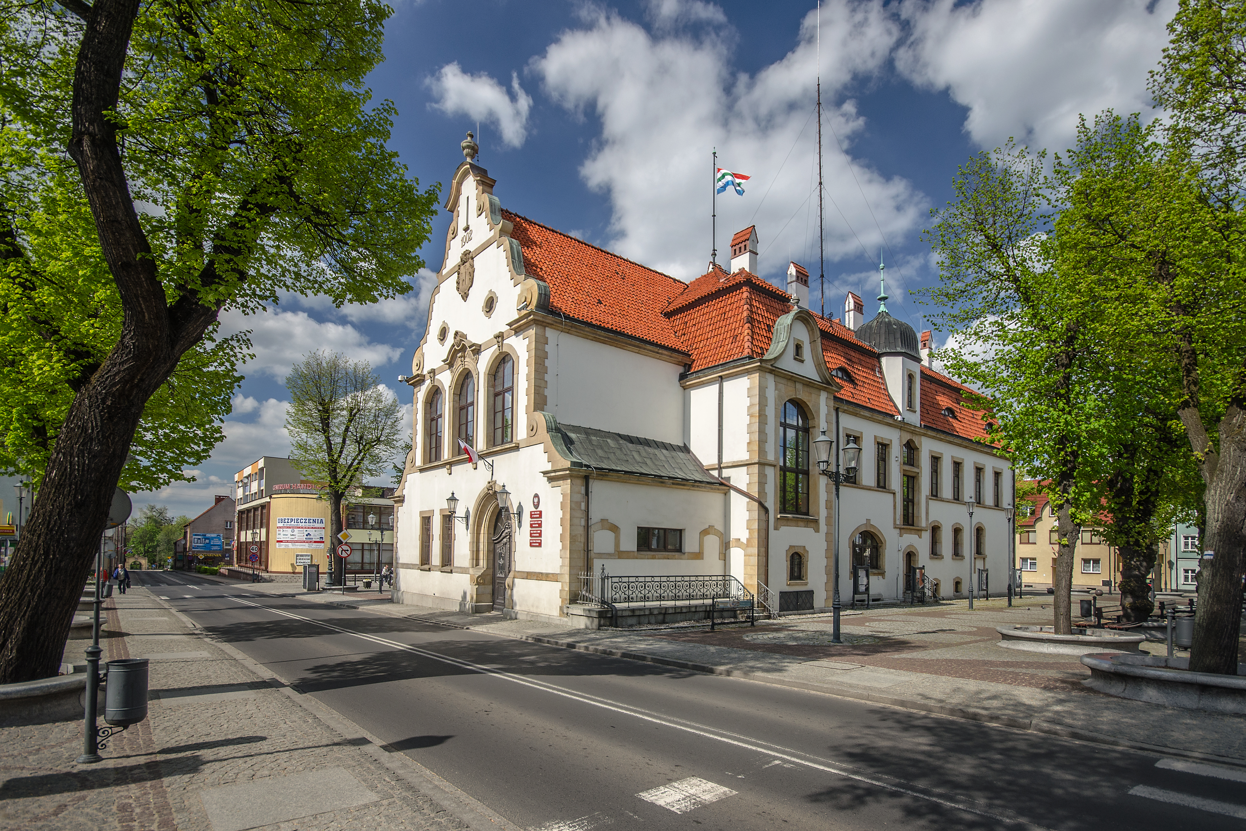 Ratusz w Twardogórze